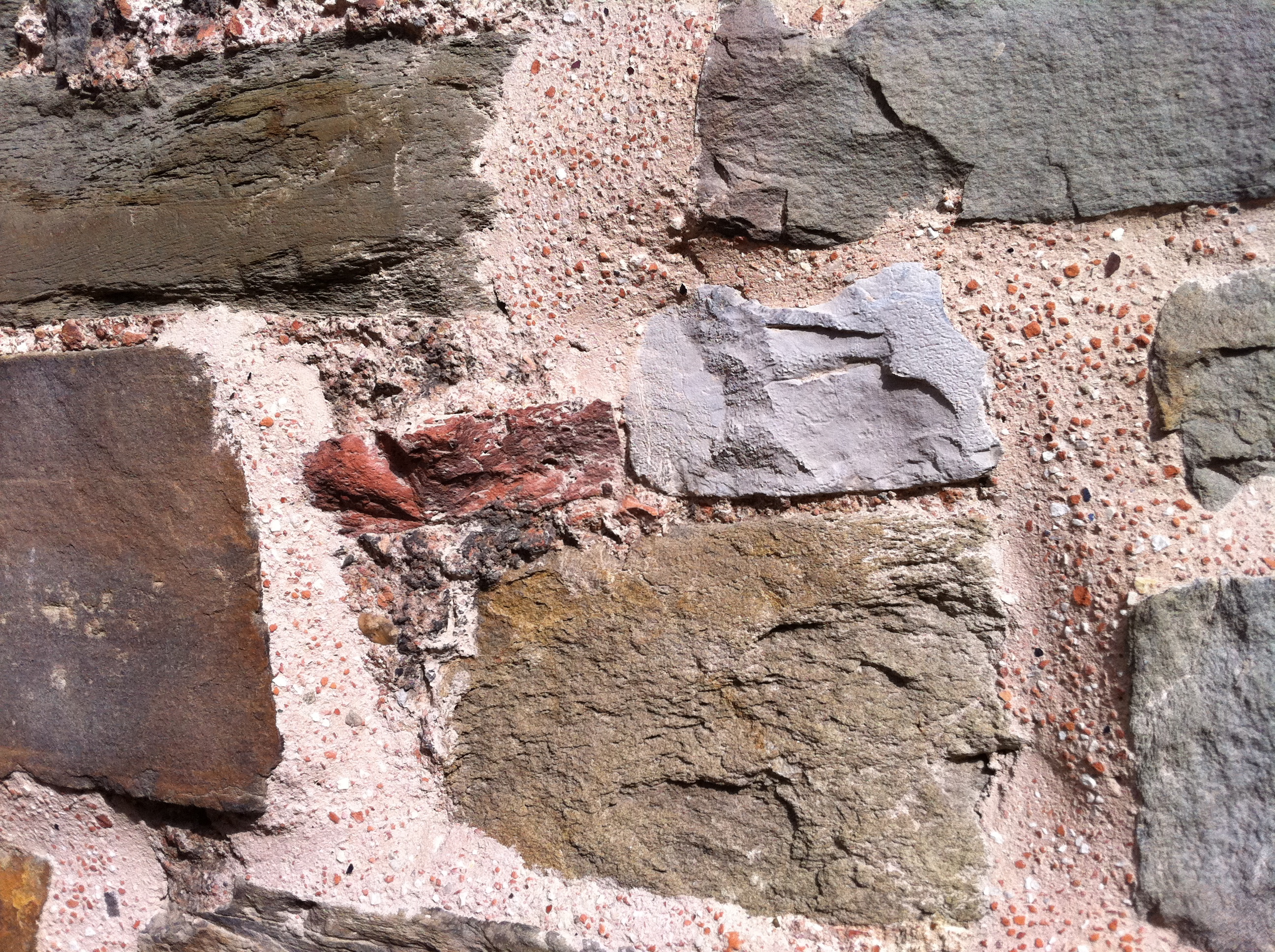 Aachener Dom: Naturwerksteine: Karolingisches Mauerwerk am südlichen Treppenturm, mit karolingischem Mörtel: Grauwacken, Ziegelsteine, Kalksteine